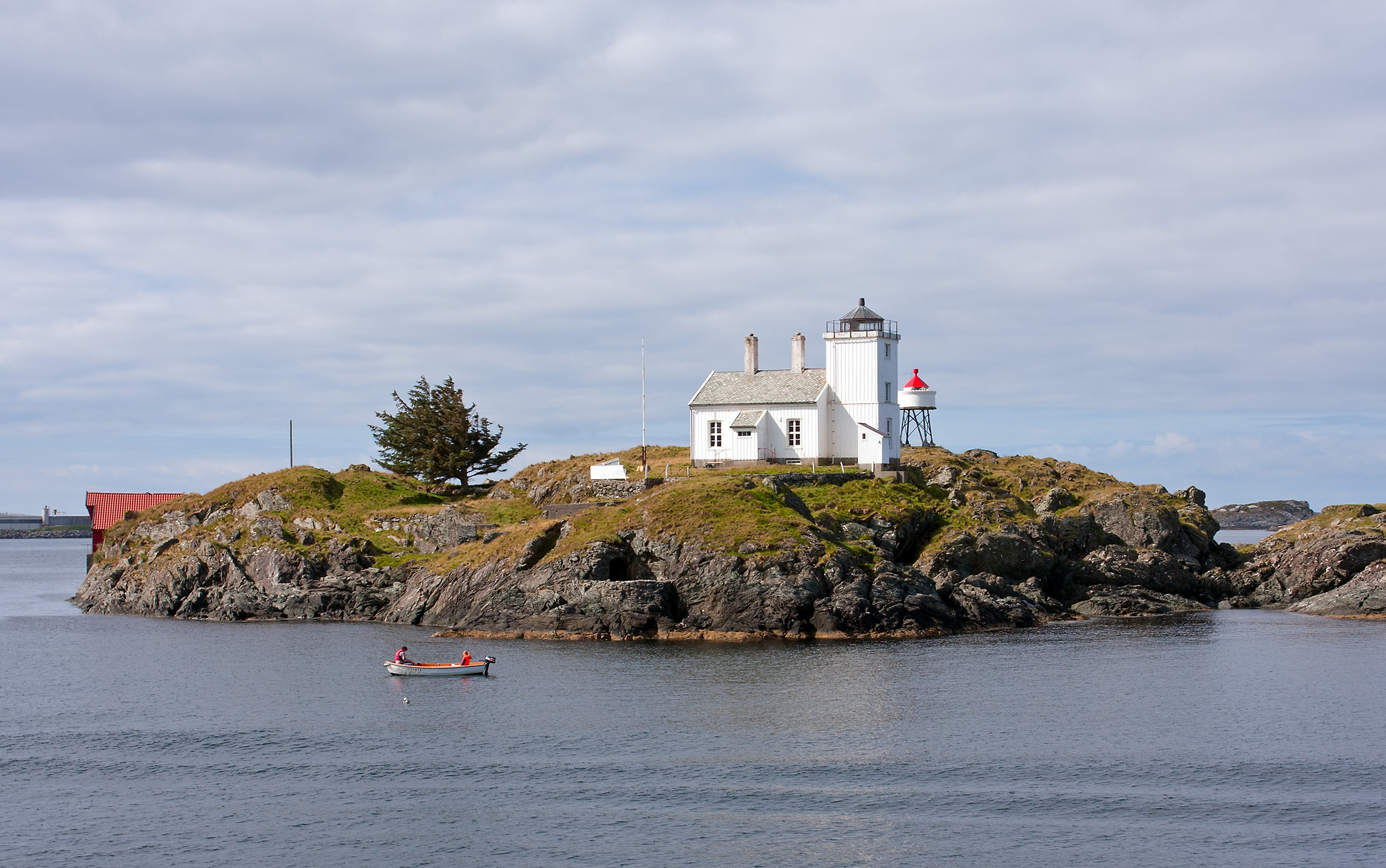 Sørhaugøy (Tonjer) fyr (lighthouse), in Haugesund, Norway